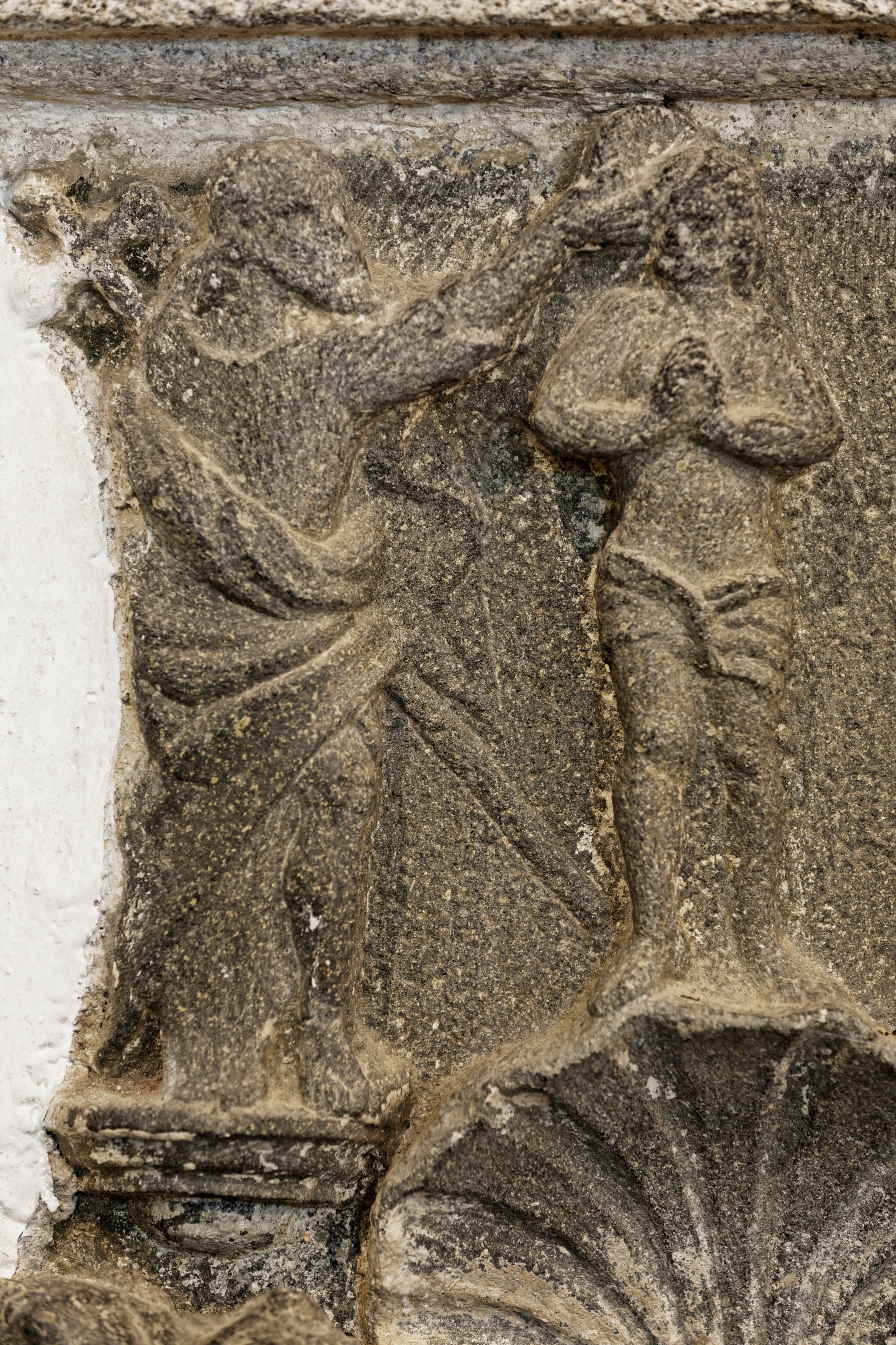 Baptême du Christ. Détail du bénitier du collateral sud de l'église Notre-Dame de l'enclos paroissial de Lampaul-Guimiliau dans le Finistère.